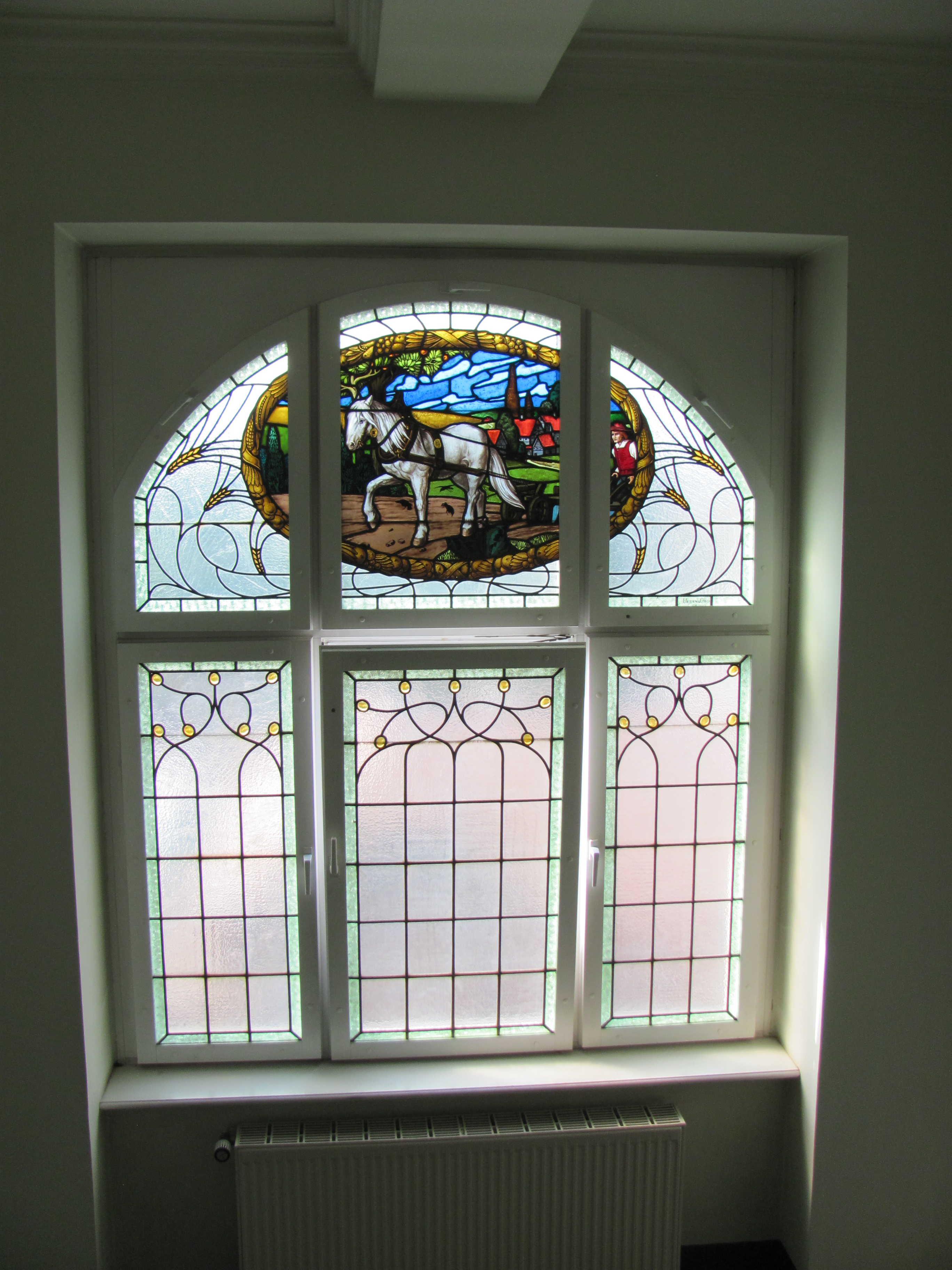 Radebeuler Rathaus Fenster